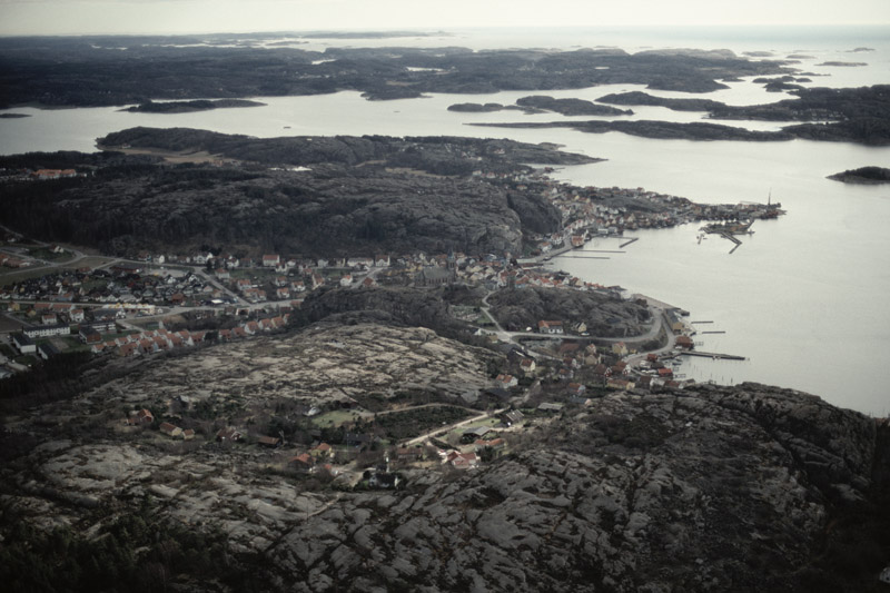 Bilden är tagen mot (väderstreck): SSV Motiv: Fjällbacka Nyckelord: Flygbilder, Riksintressen Kategori: FiskelägeBilden är tagen mot (väderstreck): SSV.